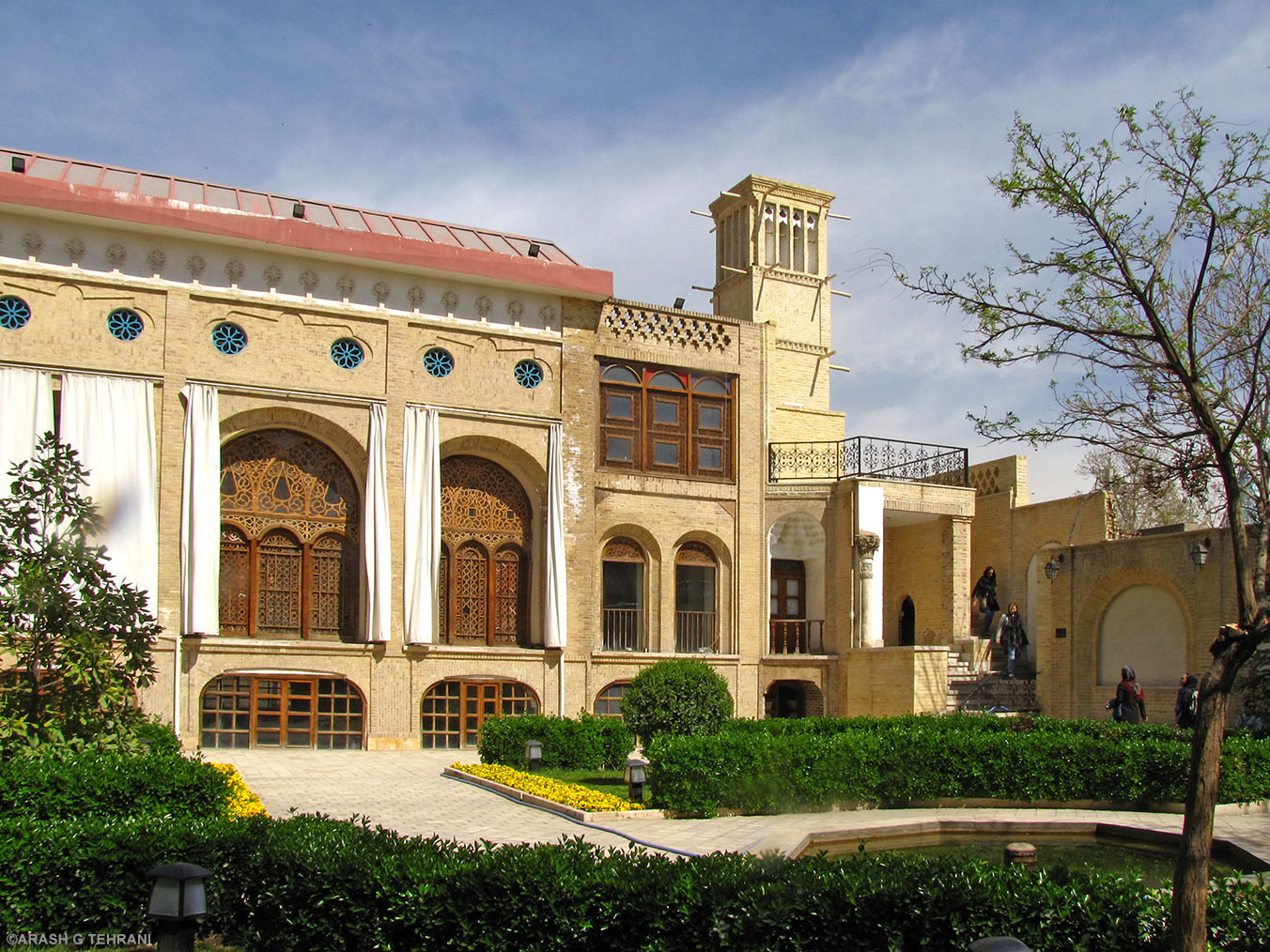 عمارت کاظمی - آرش غلامعلی طهرانی